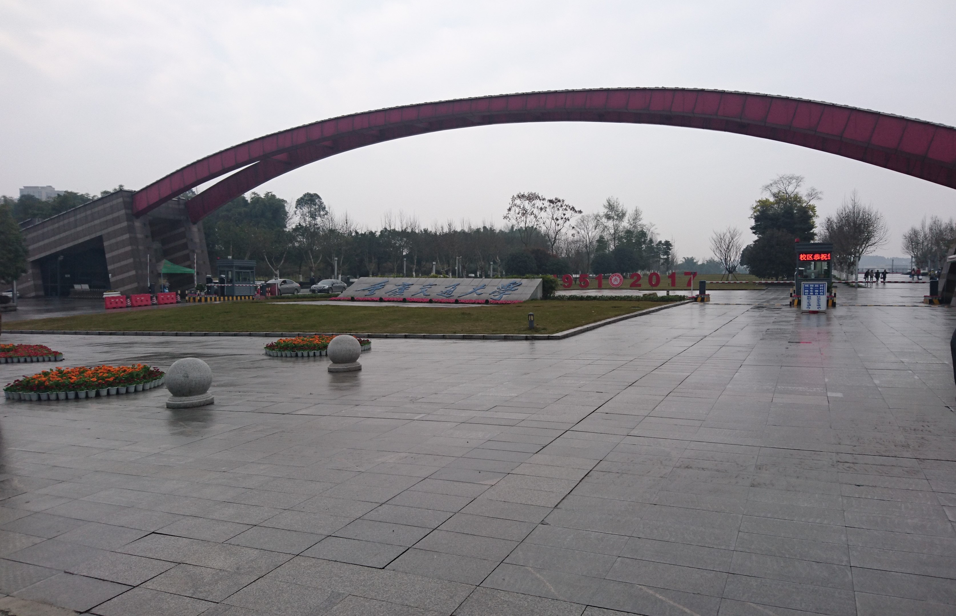 重庆交通大学双福校区南门照片，摄于2017年2月，江津双福。